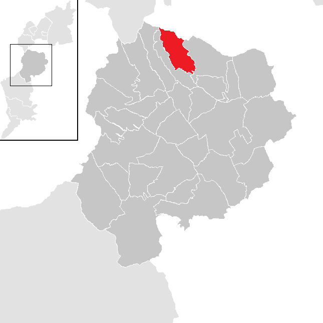 Bezirk Oberpullendorf